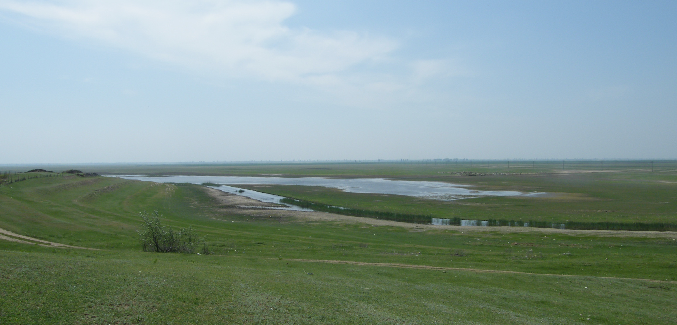 Balta Lişcoteanca vazuta de pe Movila Olarului Restricţii - fără restricţii